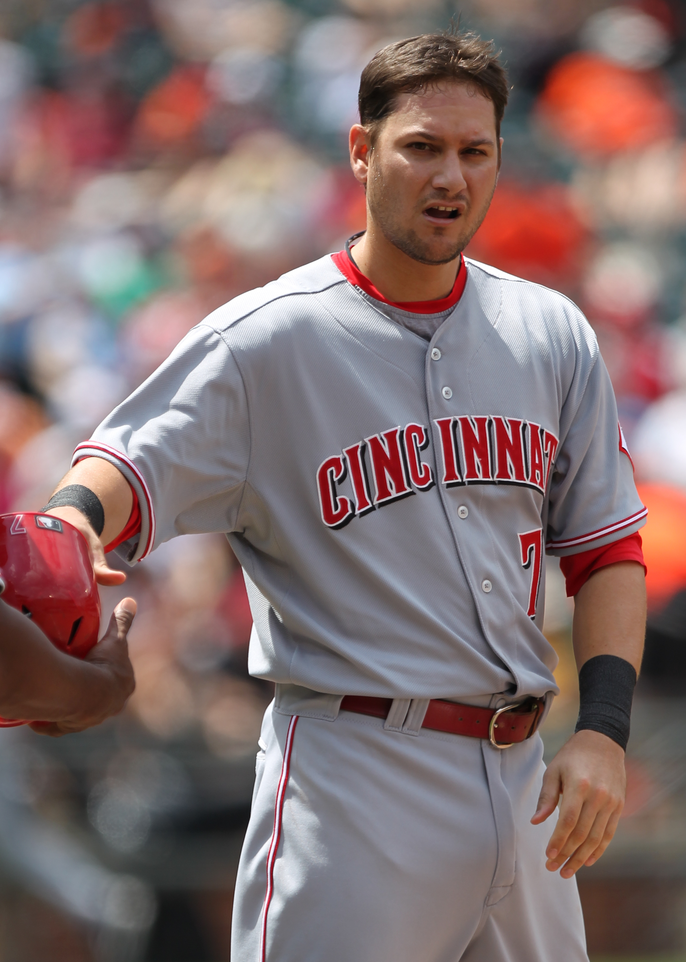 Paul Janish